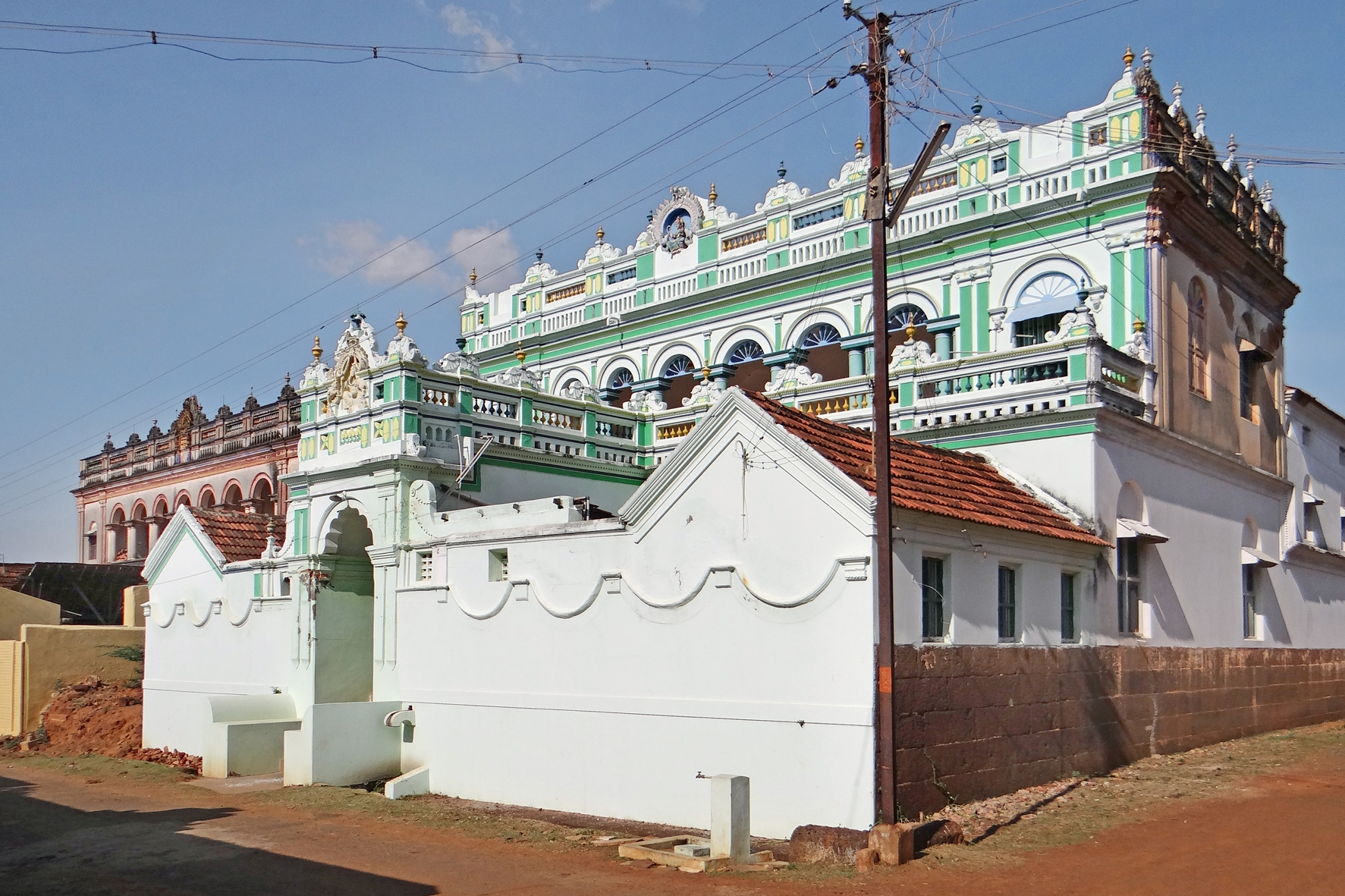 La petite ville de Kanadukathan se trouve dans le Chettinad, une région où s'est développée, depuis l'époque des Chola(s), la communauté des Chettiars. Les Chettiars appartiennent à une caste de commerçants qui se sont enrichis dans la banque et dans diverses activités lucratives, durant l'occupation britannique, notamment en Birmanie et à Ceylan. Ils ont fait construire des maisons très luxueuses dans leur région d'origine comme à Kanadukathan mais n'y habitent plus depuis longtemps, ce qui donne à cette petite ville une ambiance étrange de ville déserte. Les palais construits dans un style éclectique, se ressemblent tous au niveau architectural, ils ont été peints de couleurs criardes différentes pour se différencier les uns des autres. Tous comportent sur leur façade un "kudu" (motif décoratif en fer à cheval) consacré à la déesse de la richesse Laksmi, la parèdre de Vishnou. Parmi ces palais conformes à l'image de réussite sociale que leurs propriétaires voulaient donner, se trouvent quelques petits bâtiments de style art déco plus intéressants mais pas toujours entretenus. Article de Wikipedia sur le Chettinad, pays des Chettiars